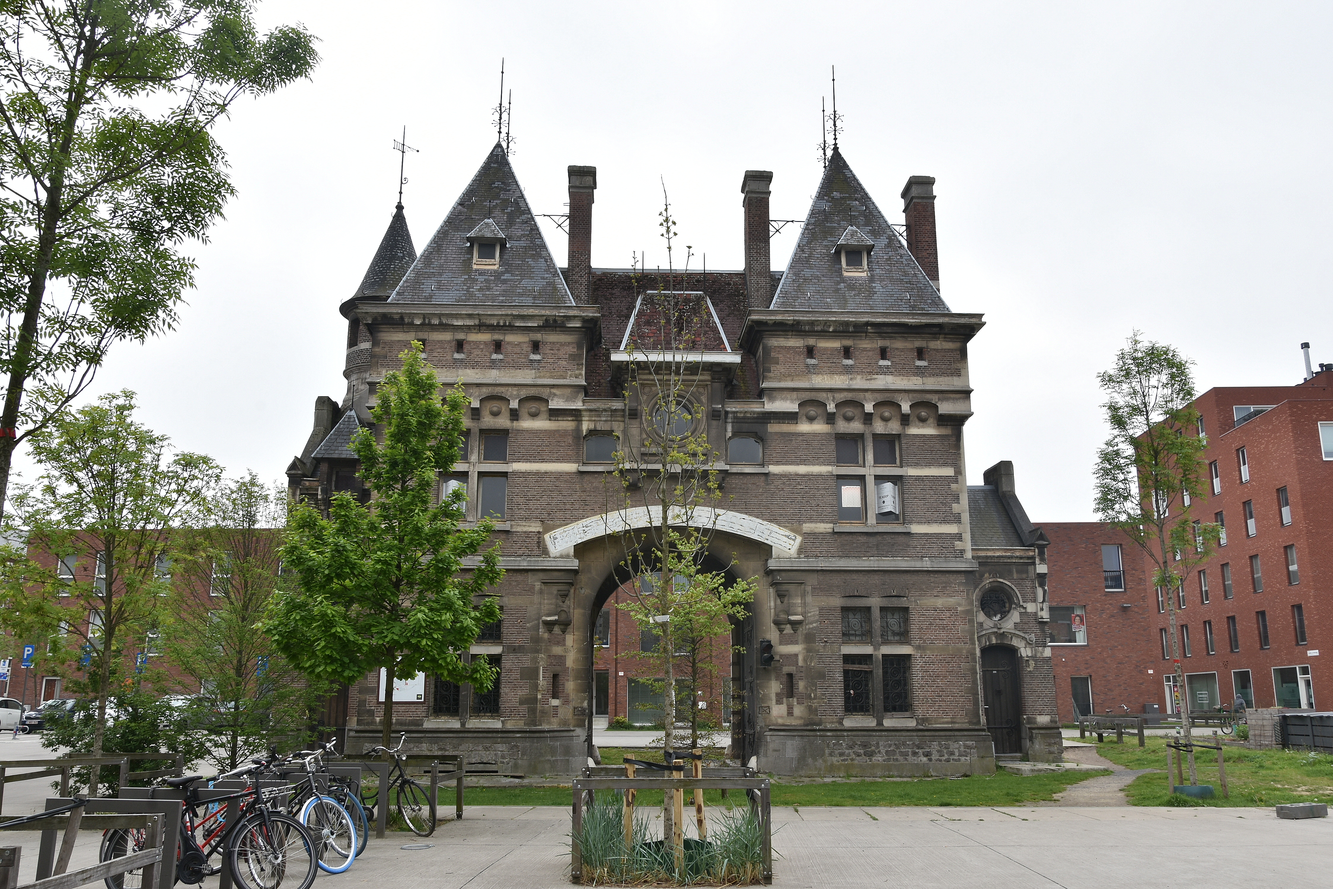 Poortgebouw Arsenaal Voormalig Militair Hospitaal en Arsenaal Antwerpen 1-05-2019